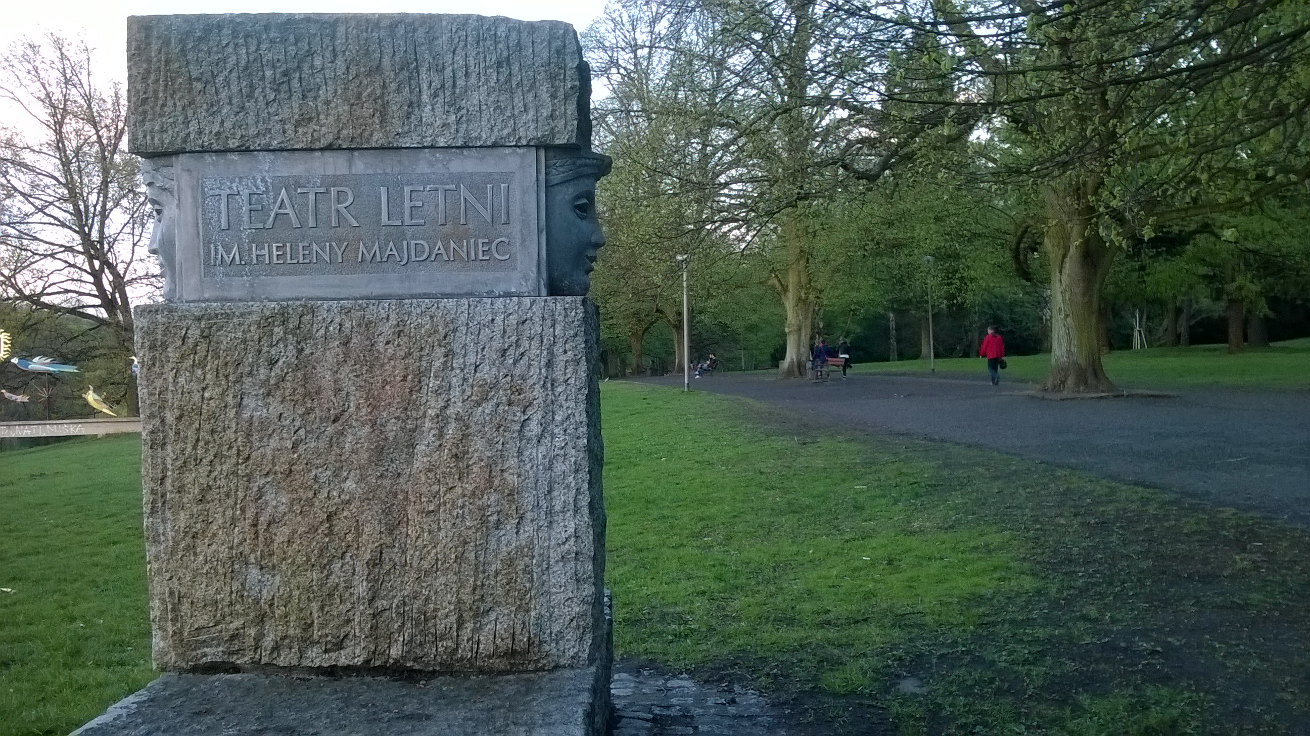 Aleja Juliana Fałata w Parku Kasprowicza w Szczecinie (obok Teatru Letniego im. Heleny Majdaniec